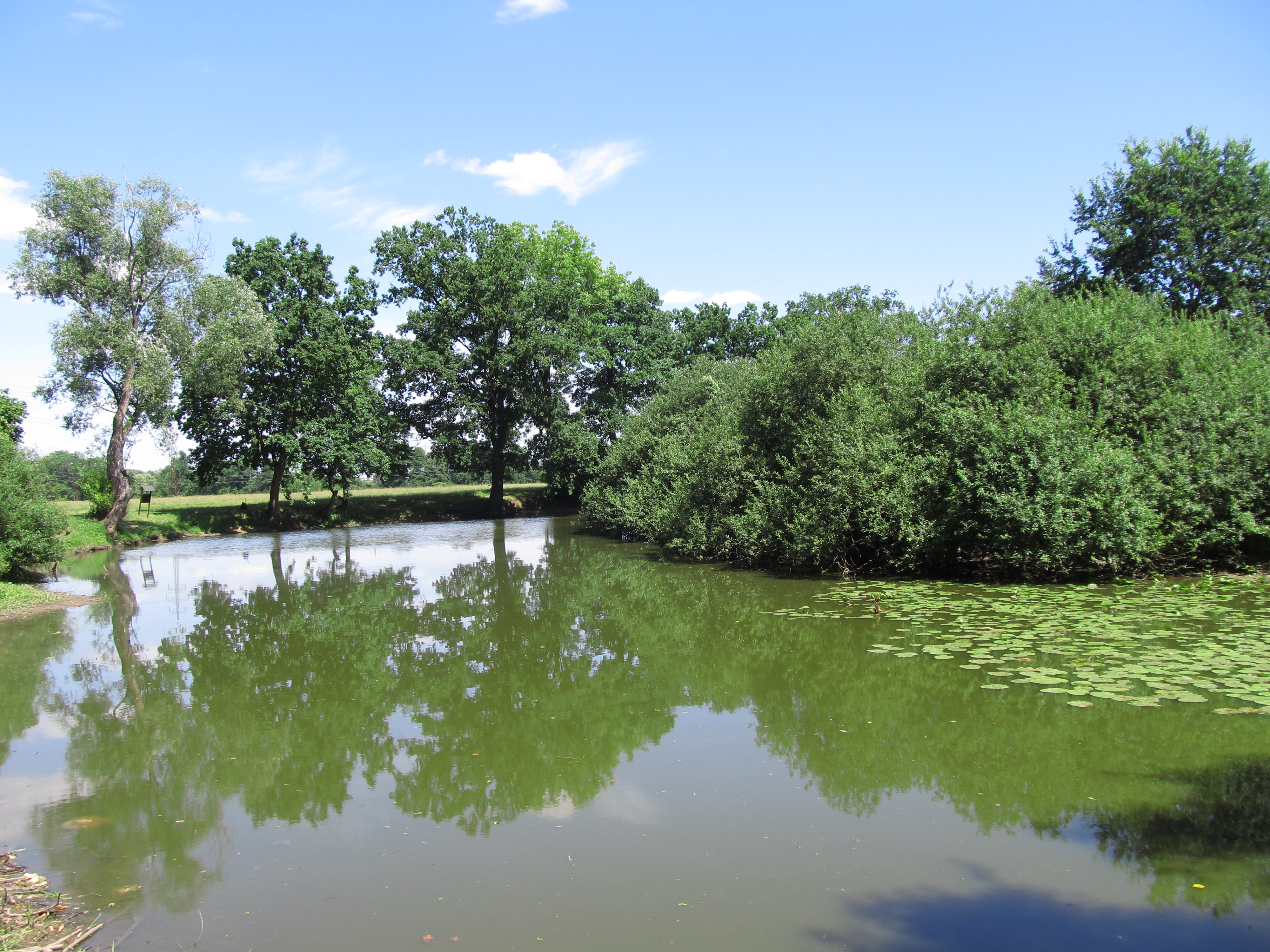 slepé rameno